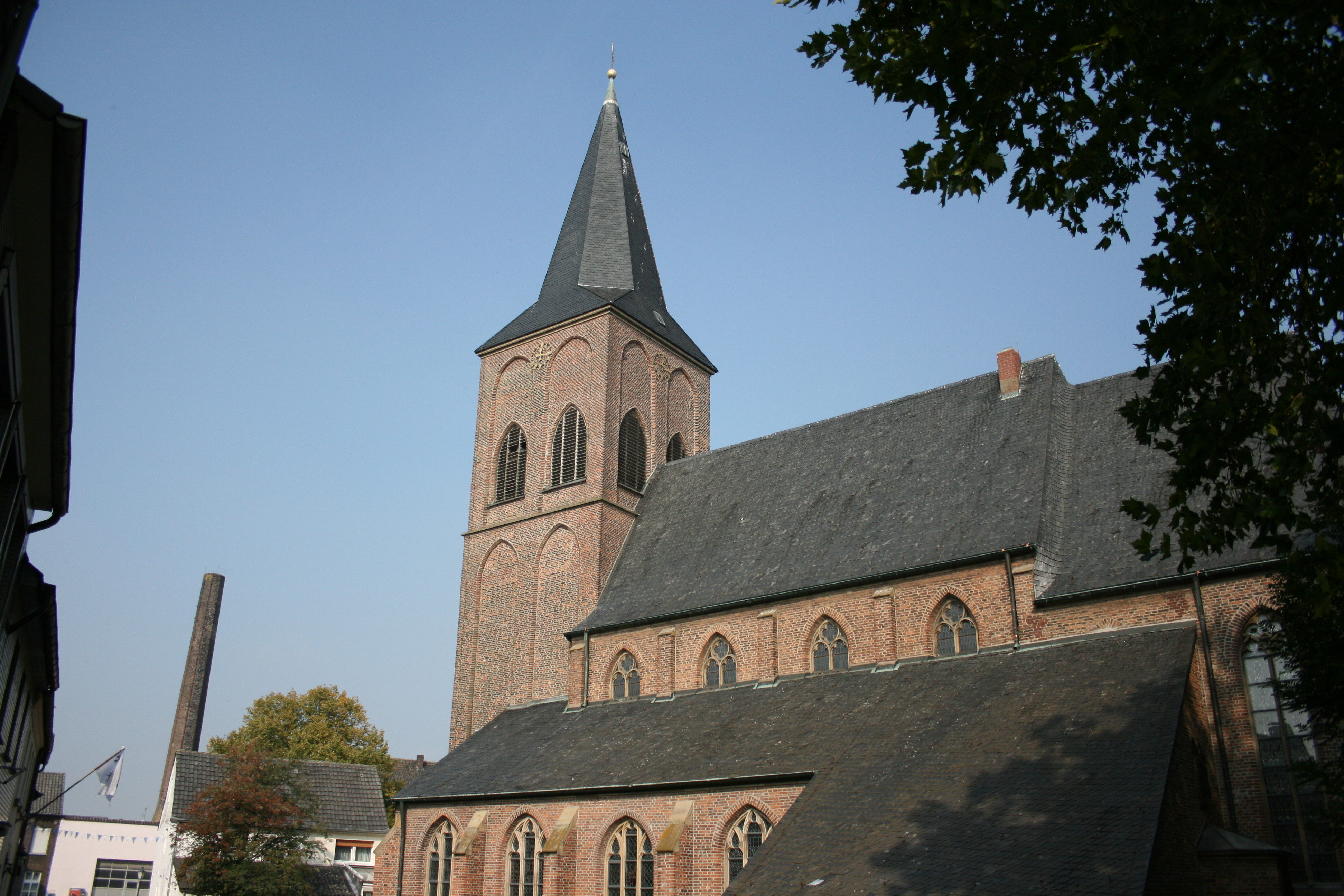 Sankt Peter und Paul in Kalkar-Grieth